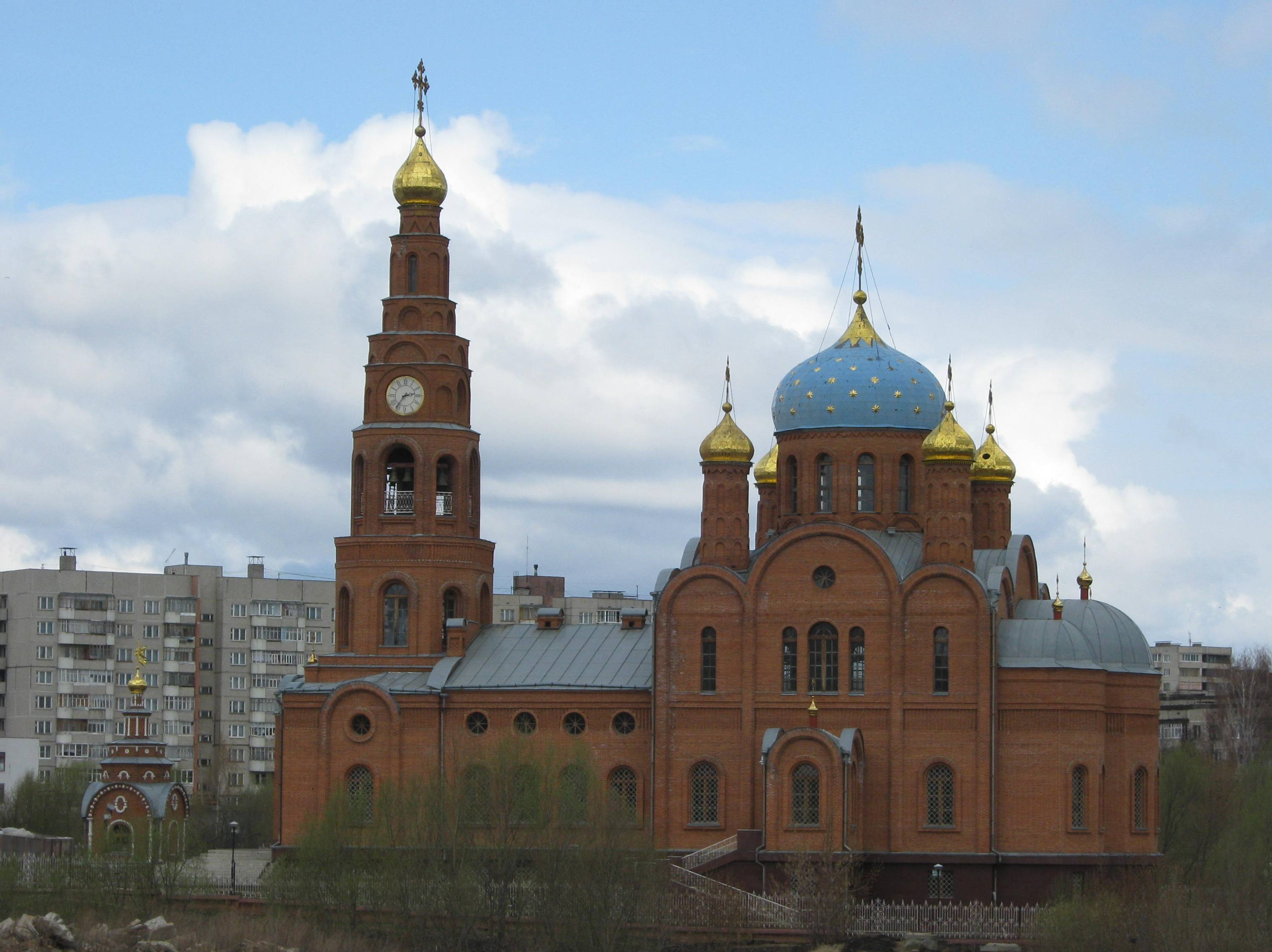 Новочебоксарский Храм